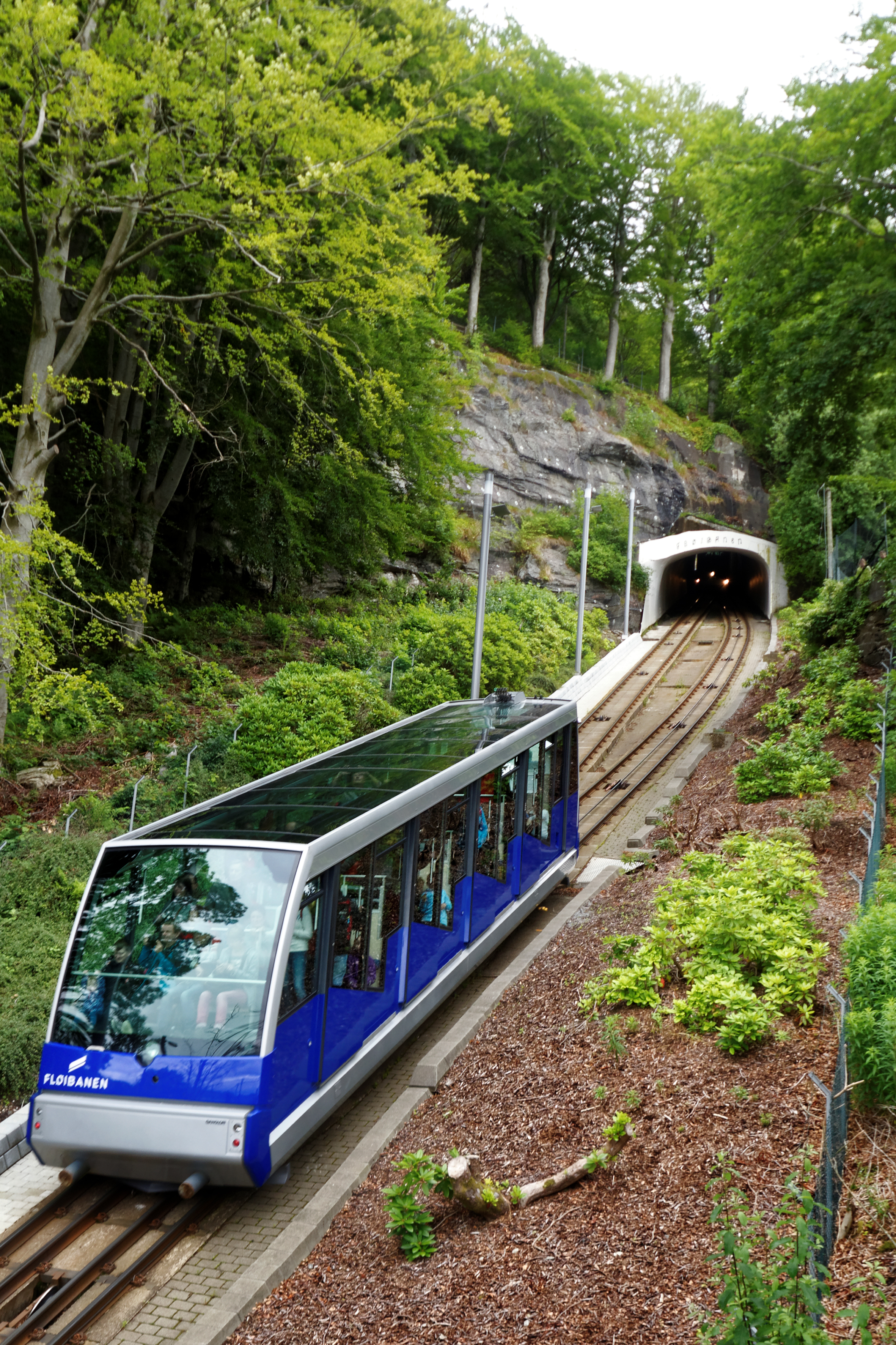 Blick vom Floyen über Bergen.